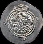 Pièce datant du règne d'Azarmedûkht.